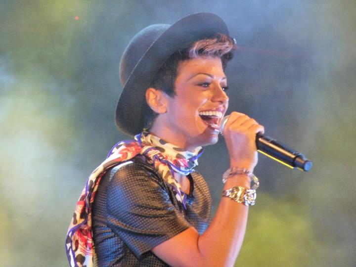 dolcenera live 2011